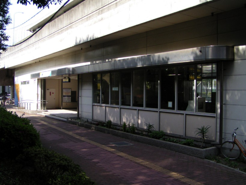 2005年4月17日に投稿者がja:鳥浜駅で撮影。